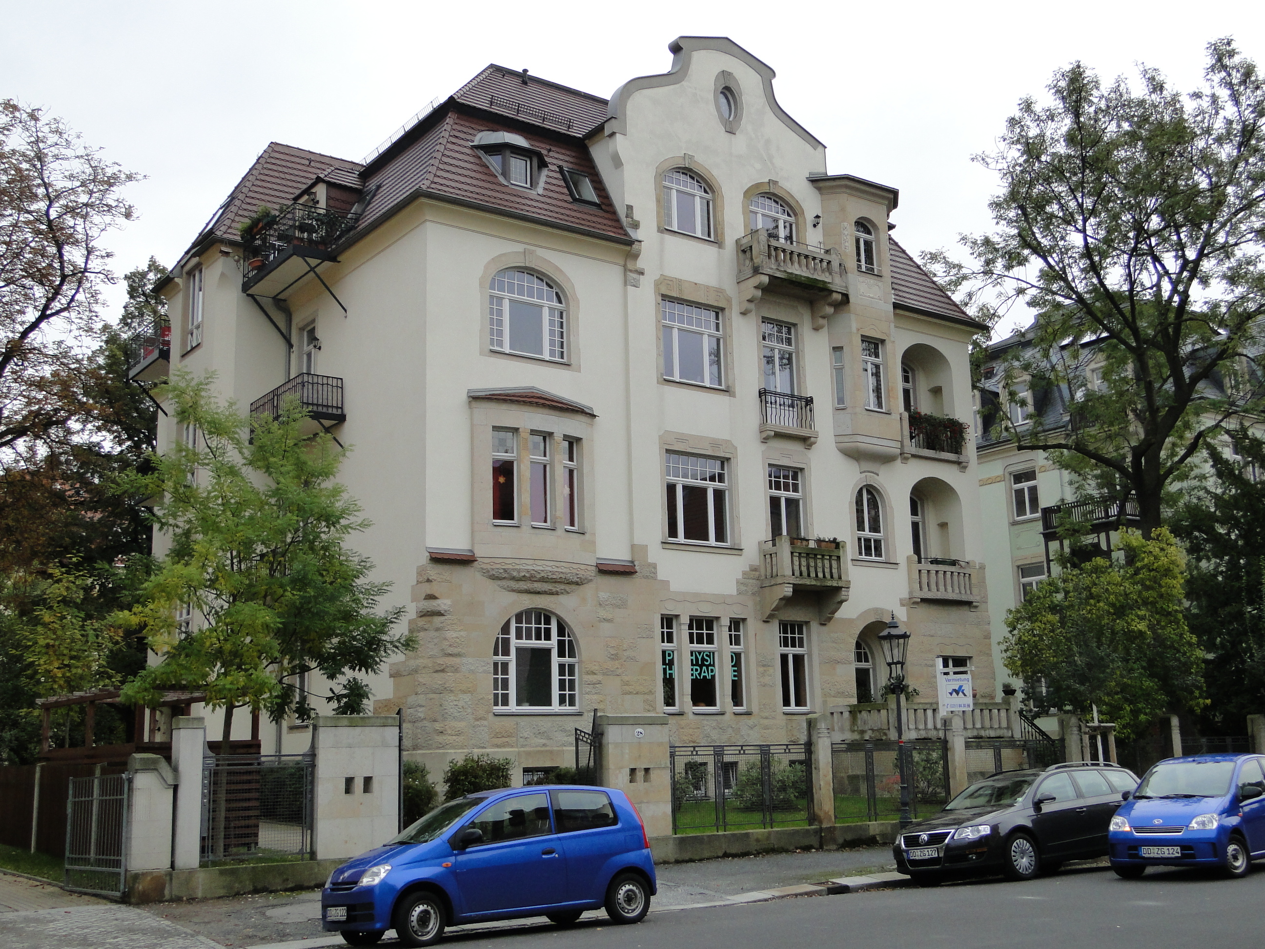 Jugendstilbau in Dresden